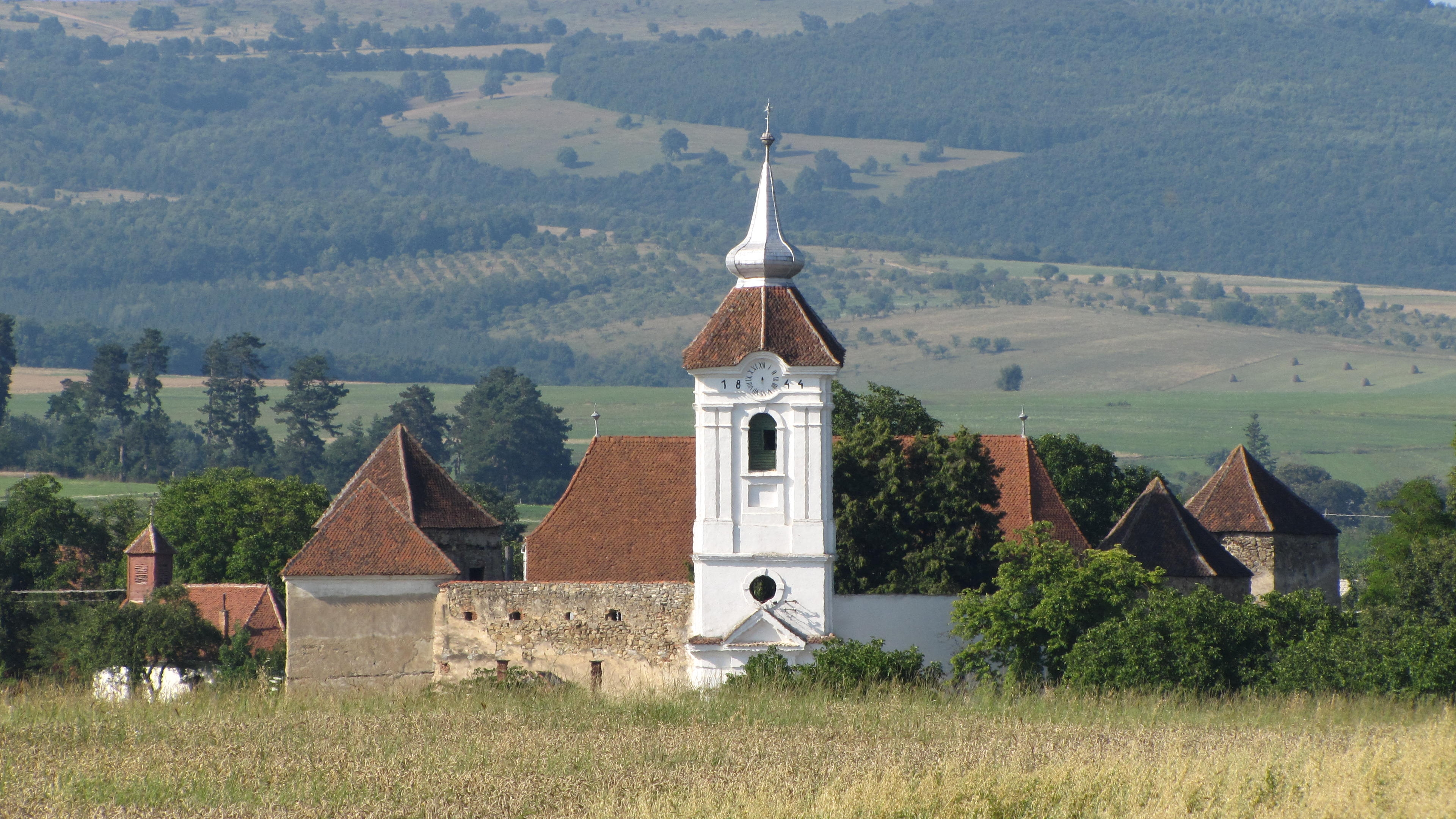 Biserica unitariană din Arcuş (jud. Covasna) este o biserică fortificată, construită în secolul 17. Are 4 bastioane şi un turn-clopotniţă.